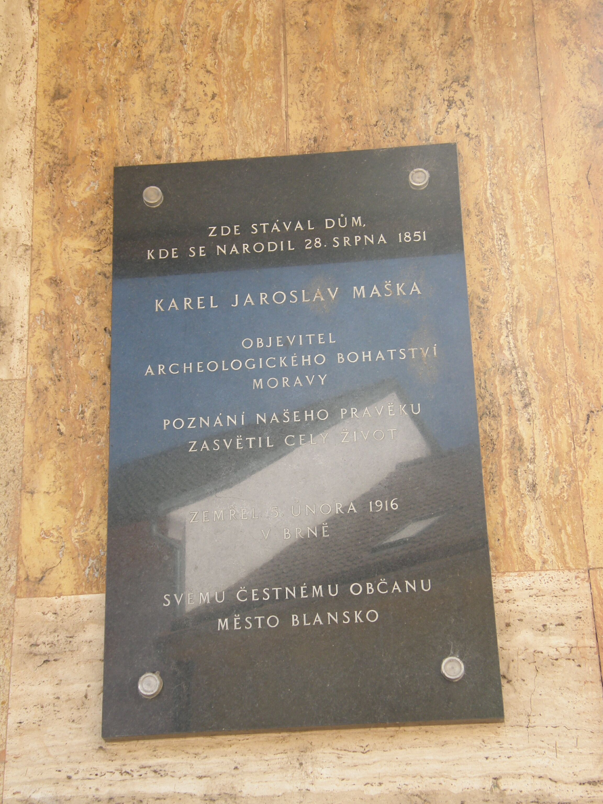 Pomník věnovaný Karlu Jaroslavovi Maškovi umístěný v Blansku na ulici Rožmitálova